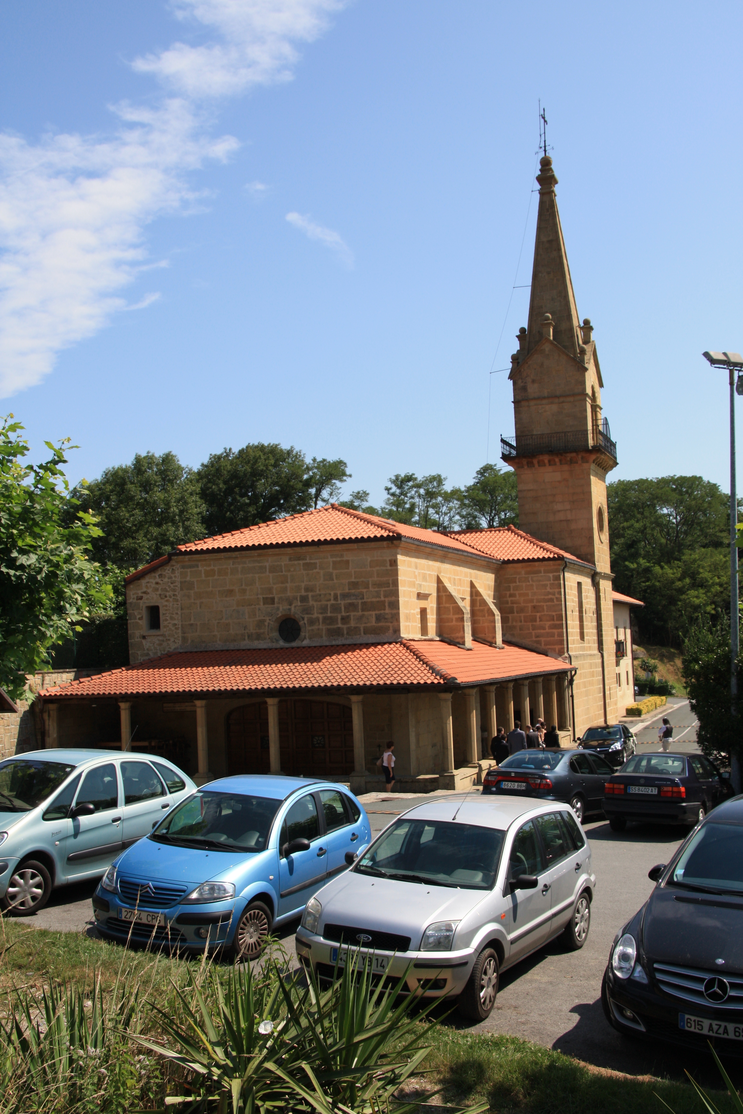 Guadalupeko baseliza, Hondarribia. Gipuzkoa, Euskal Herria. Guadalupe hermitage, Hondarribia. Guipuscoa, Basque Country.